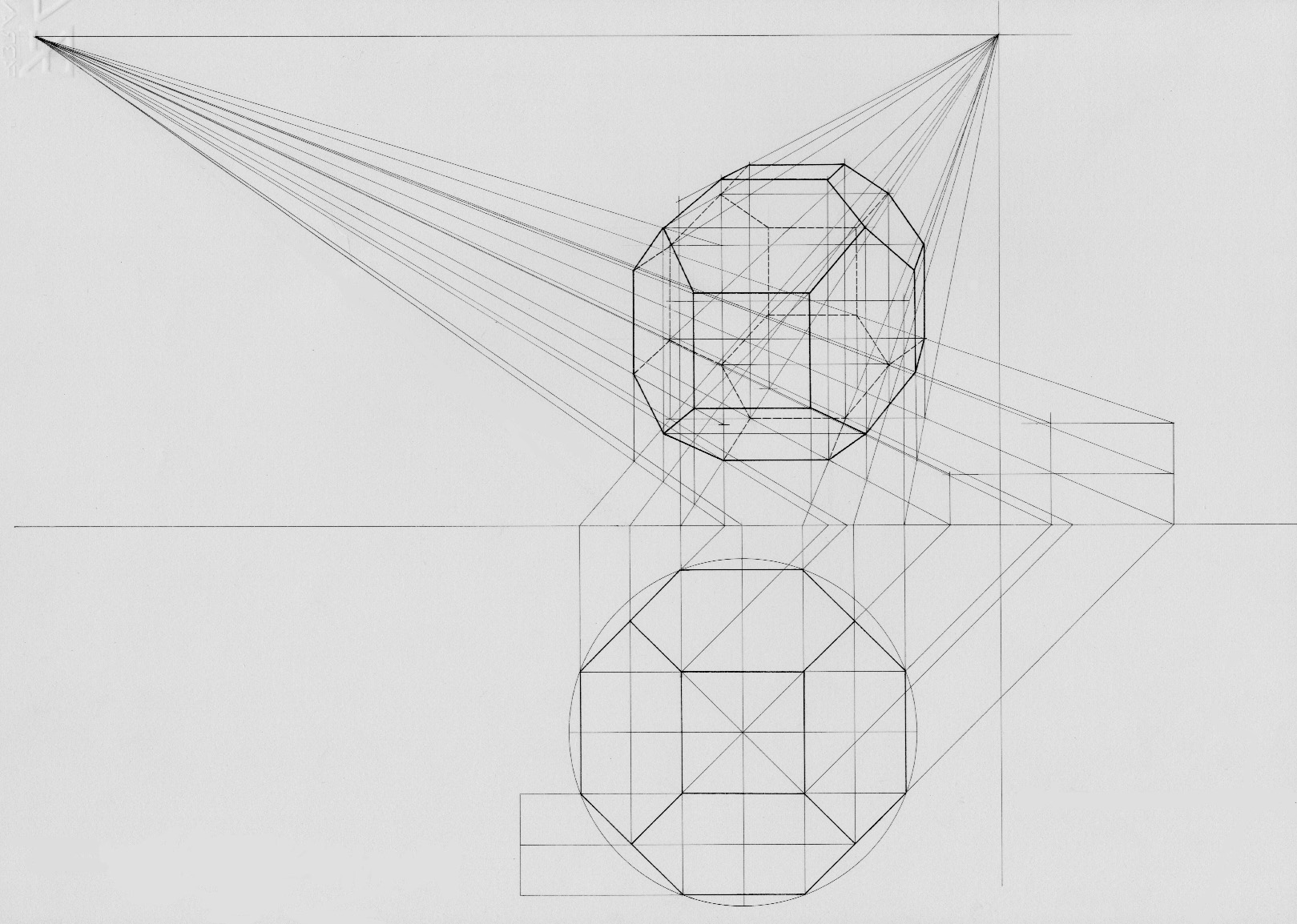 Prospettiva frontale di un solido ottenuta con il metodo dei punti di distanza. Il file è stato creato scandendo il disegno con uno scanner.